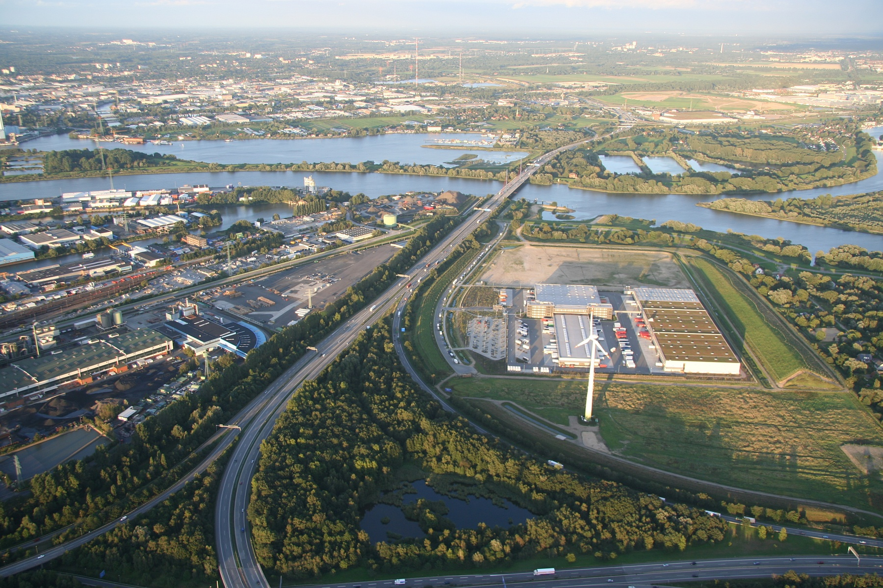 Bundesautobahn 1, im Vordergrund das Autobahnkreuz Süd, in der Bildmitte die Autobahnbrücke Moorfleet, im Hintergrund das Autobahndreieck Südost